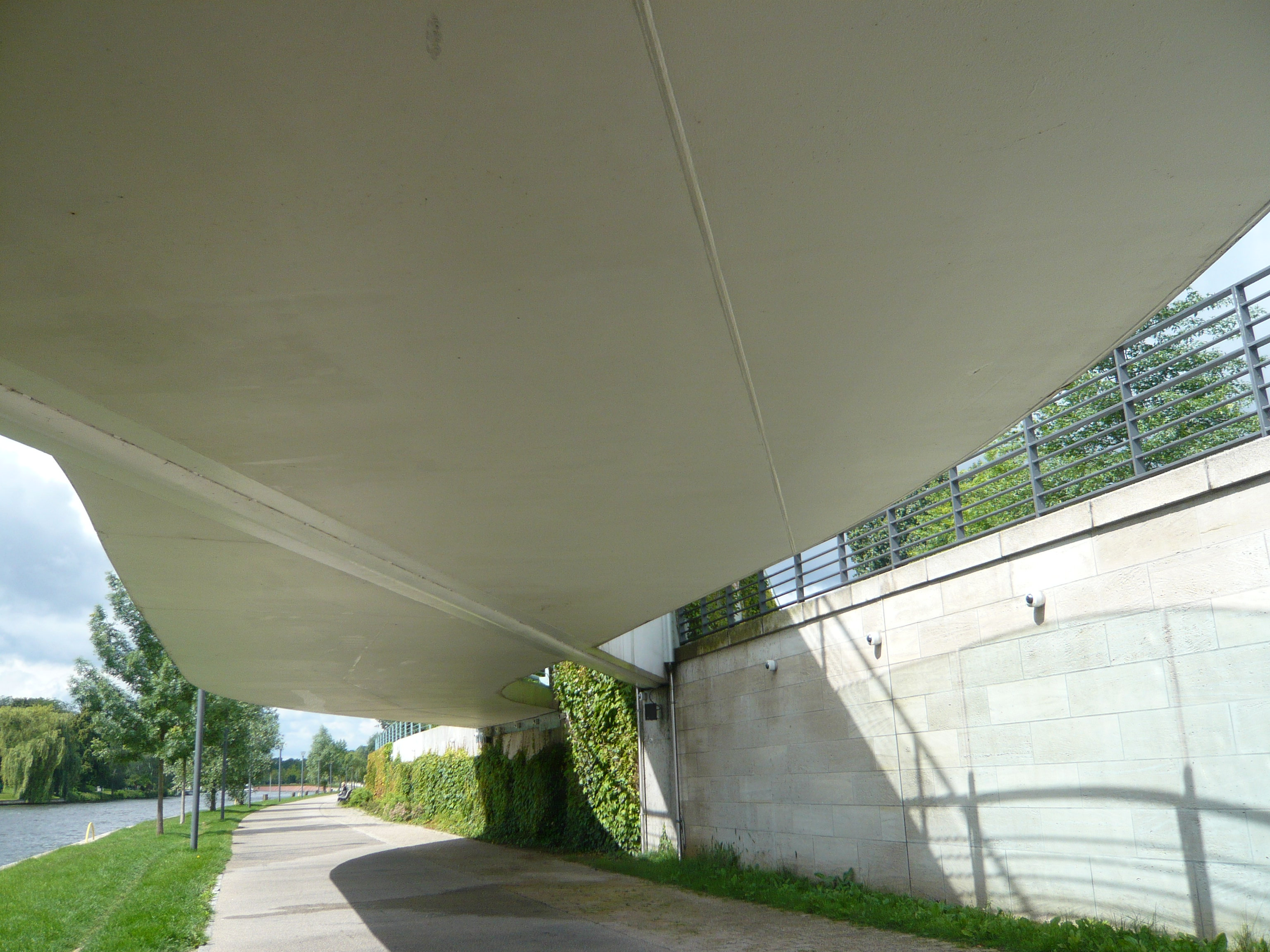 Kanzleramtssteg Berlin Spree, Detail